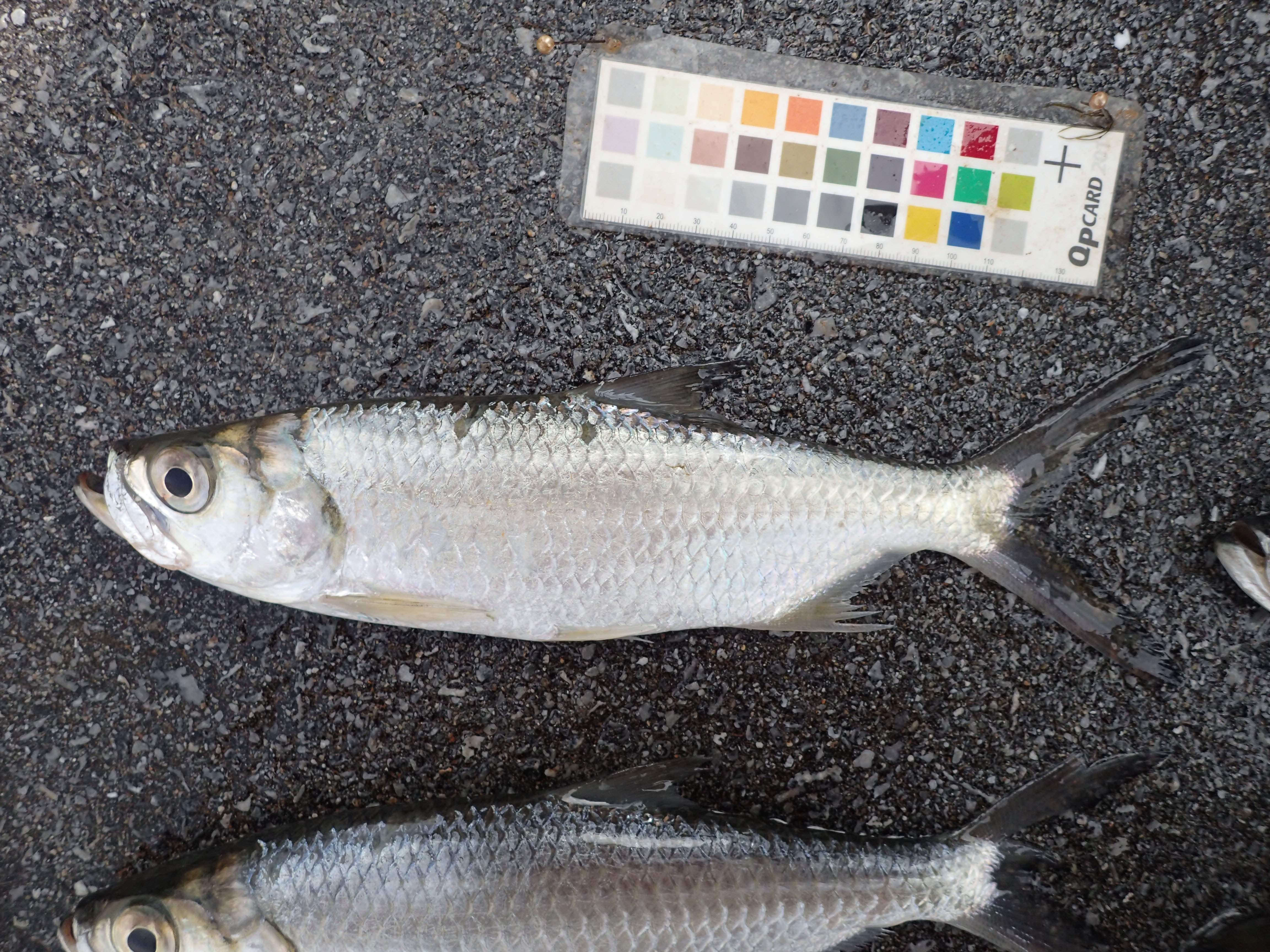 イセゴイの若魚、久米島。詳細